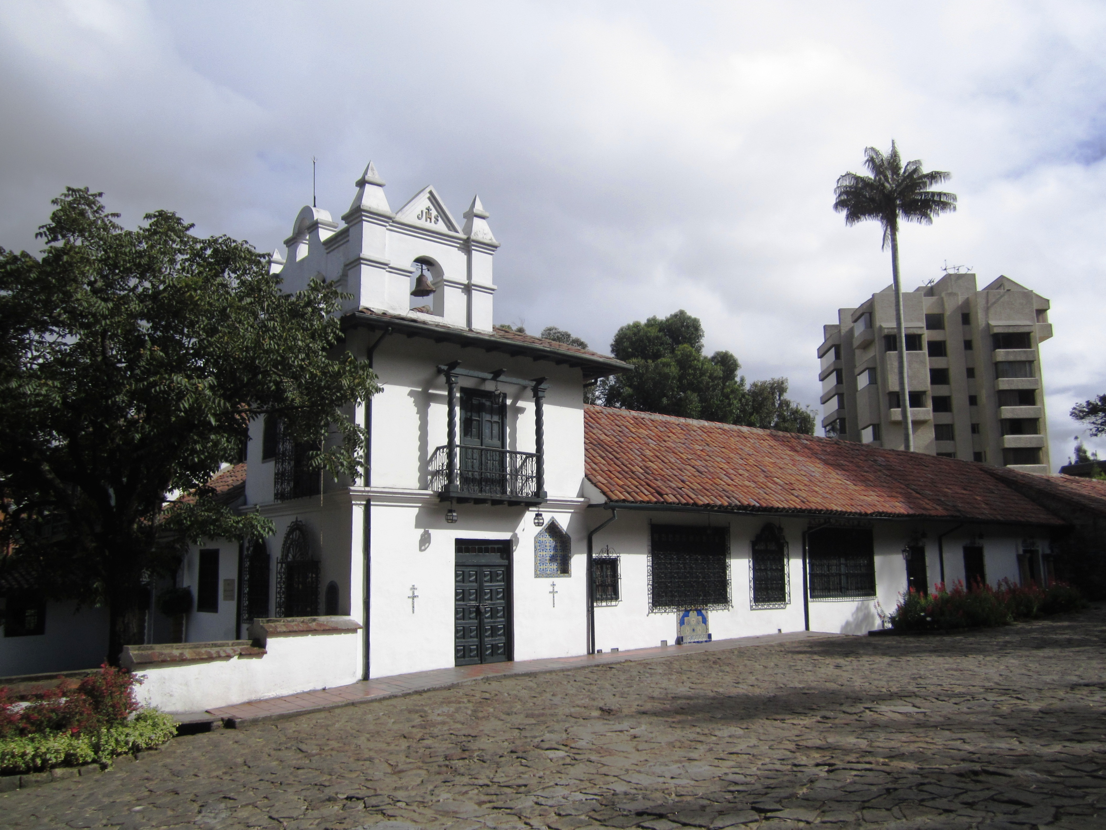 Hacienda sede del Museo El Chicó.